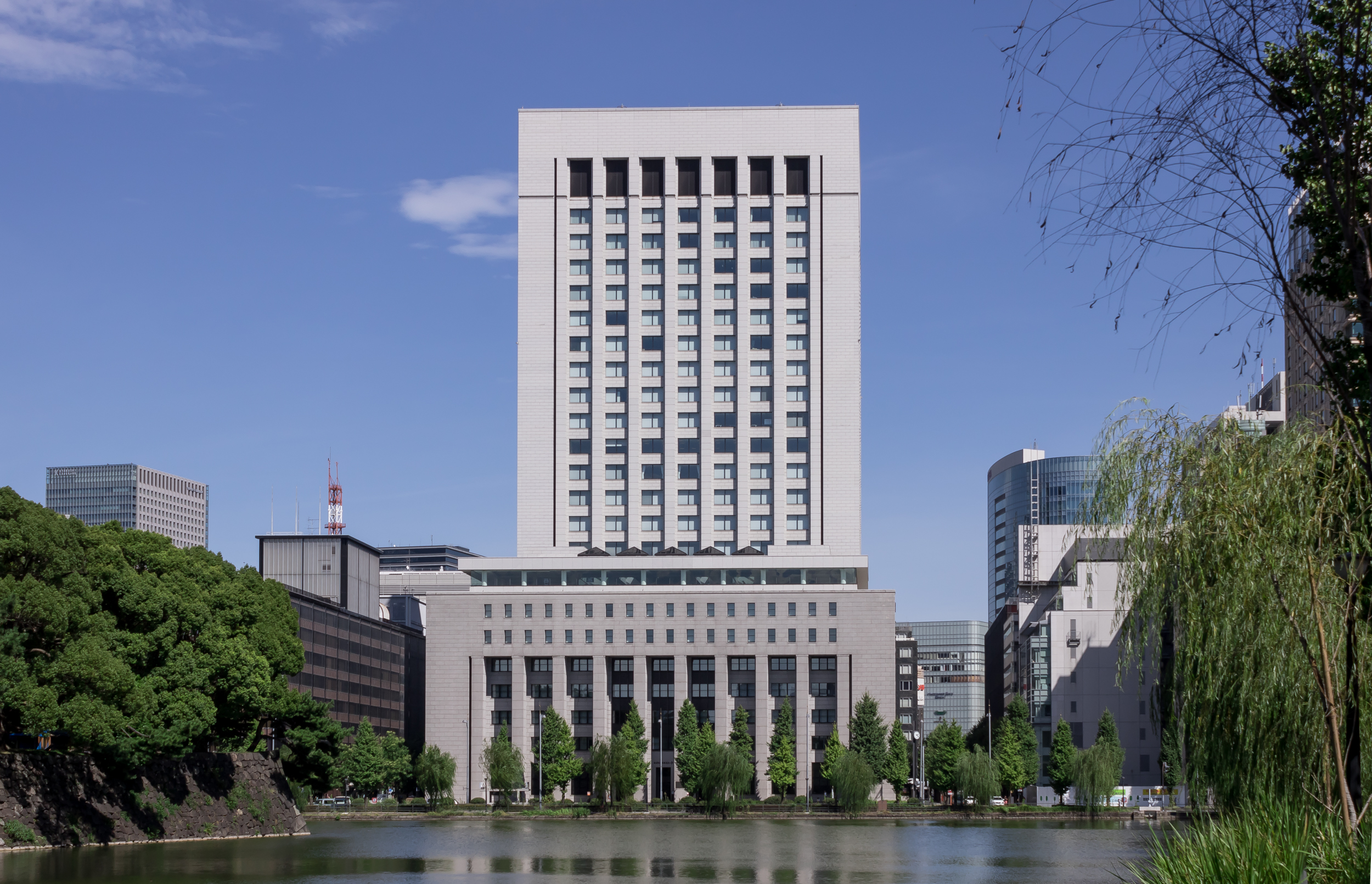 第一生命本社